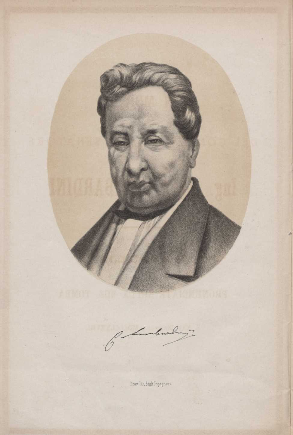 ritratto di Elia lombardini datato 1878